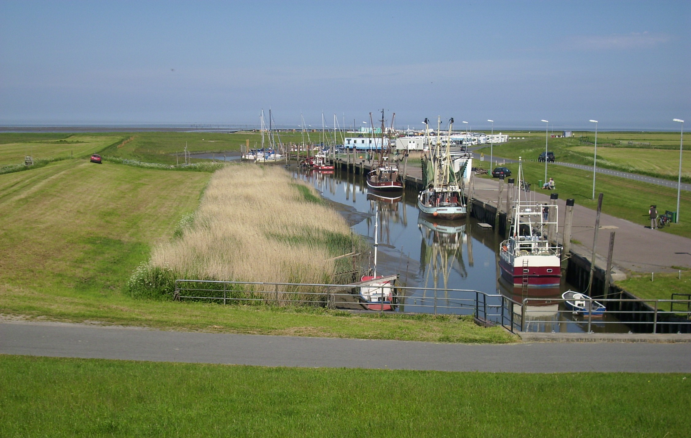 Hafenansicht in Spieka-Neufeld vom Deich aus gesehen